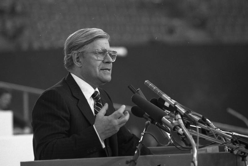 SPD-Parteitag in der Olympiahalle in München